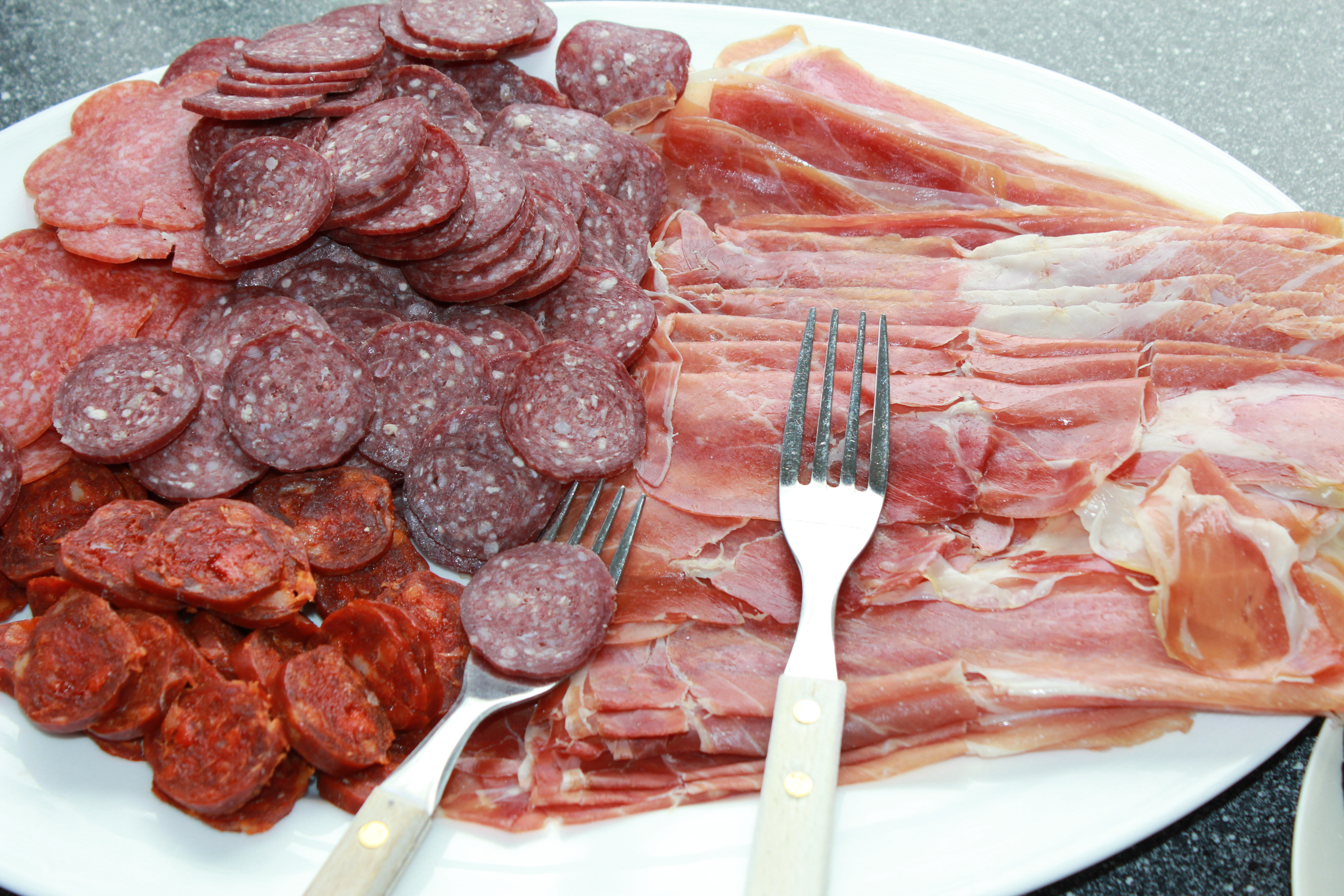 Spekemat